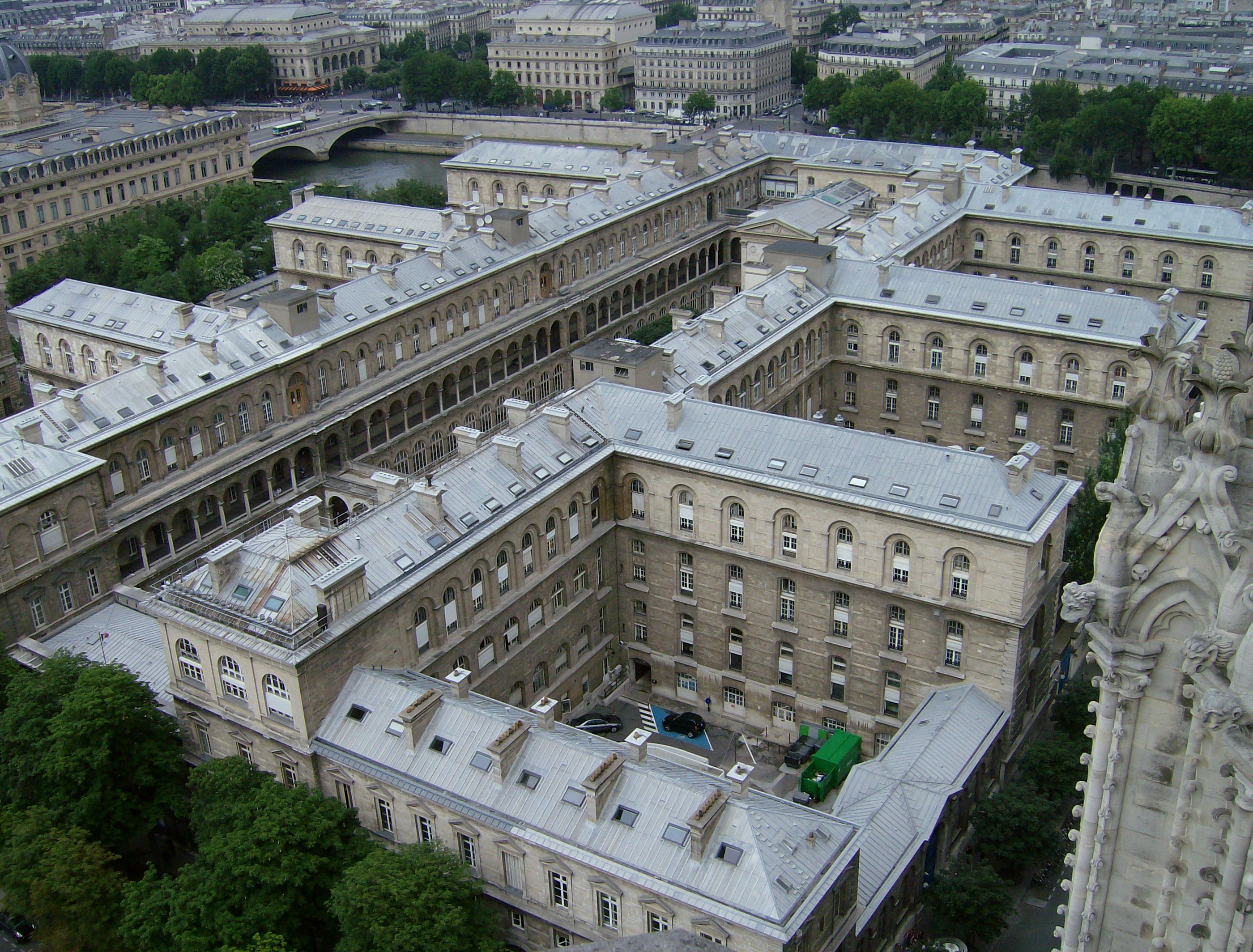 Paris 099